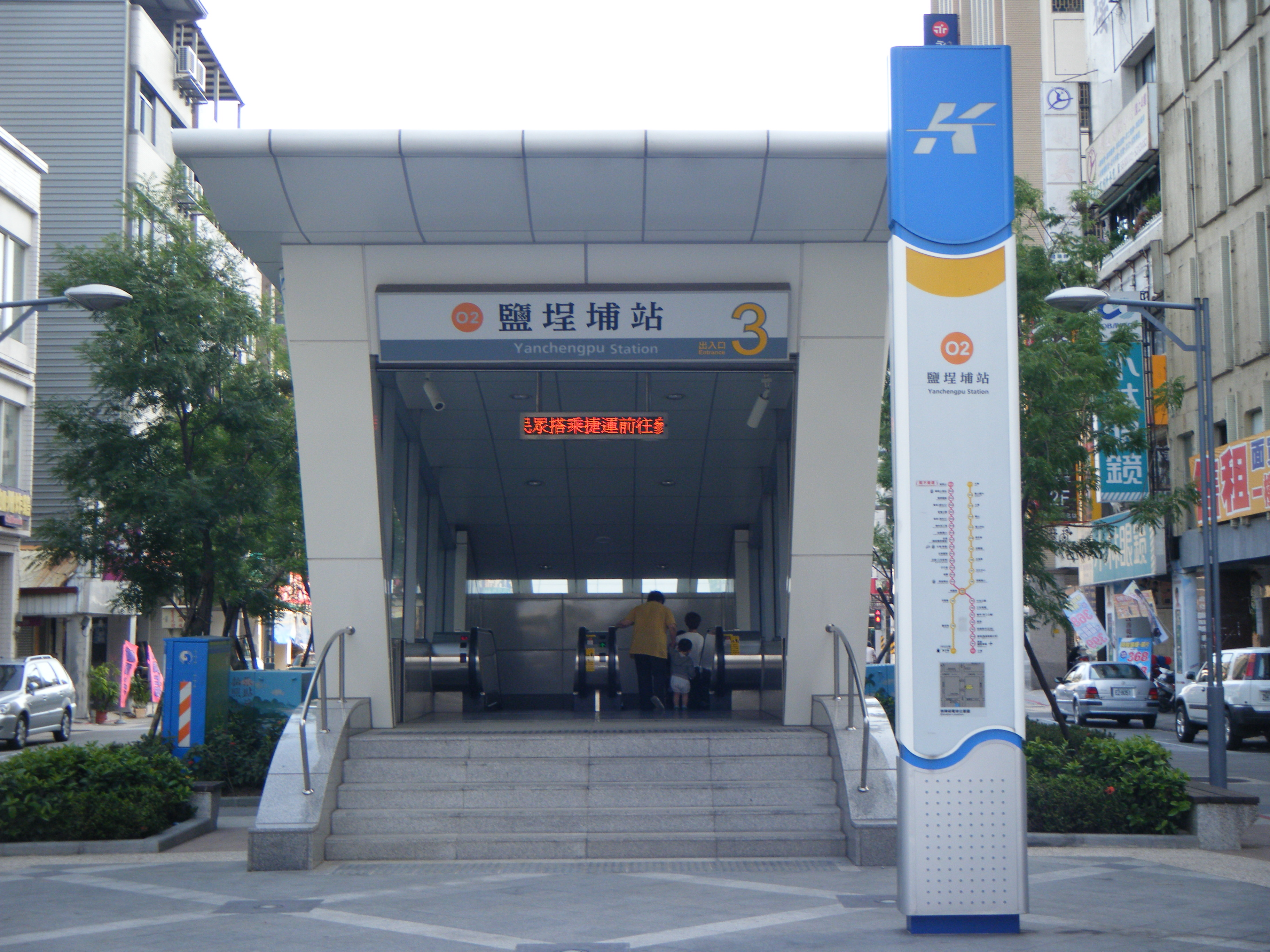 中文（台灣）: 高雄捷運鹽埕埔站3號出口。